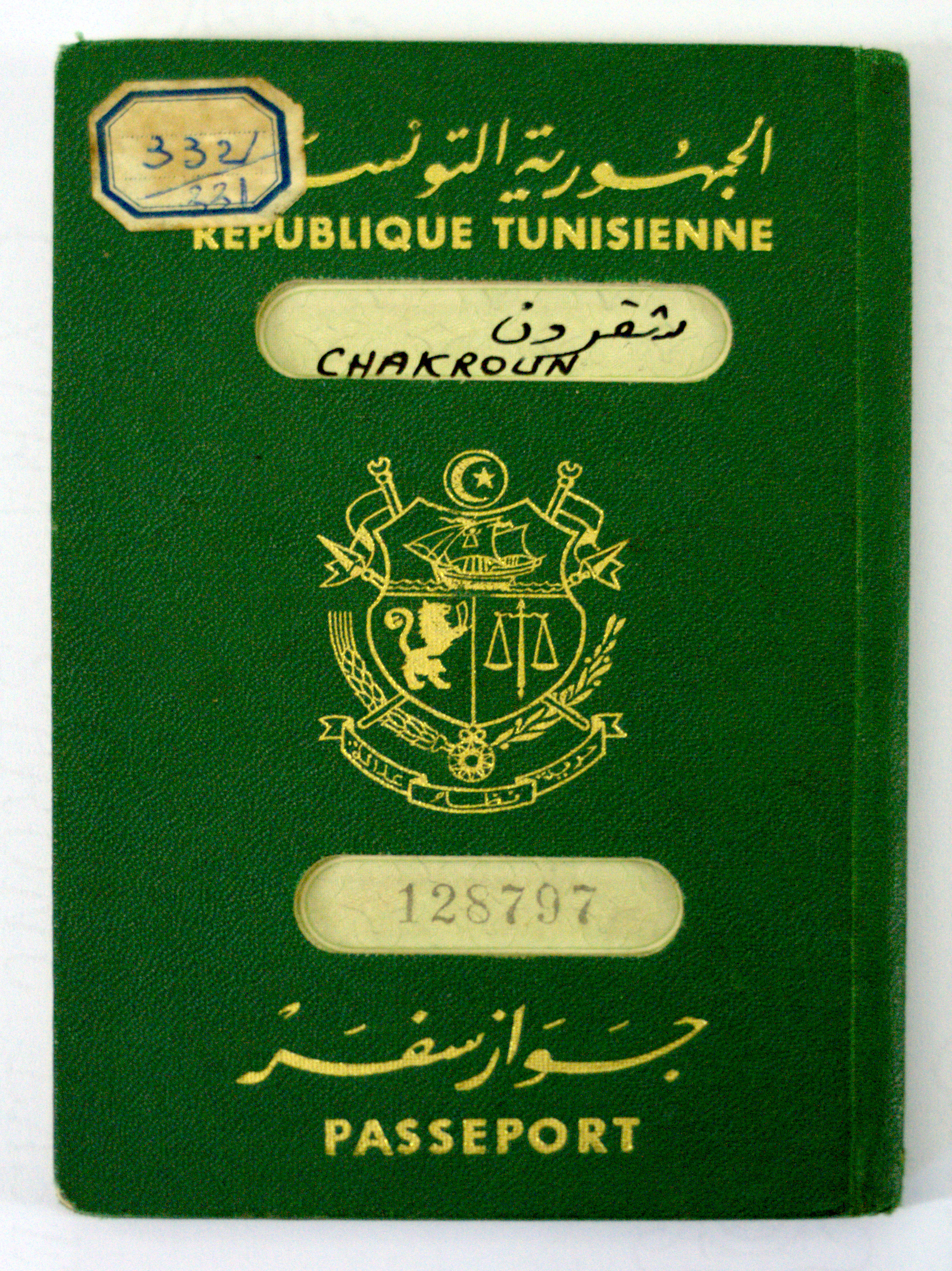 Couverture d'un passeport tunisien datant de l'année 1964 This photograph was taken with a Nikon D3100.